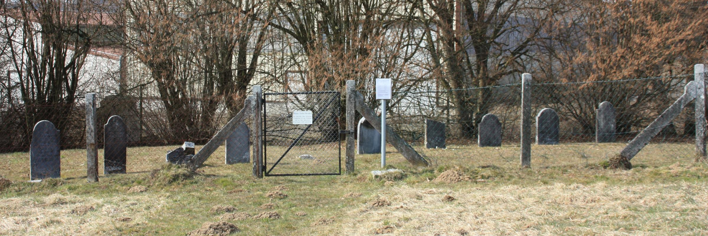 Jüdischer Friedhof von Merenberg, Hessen, Deutschland mit Grabsteinen vom 19. Jahrhundert bis 1934